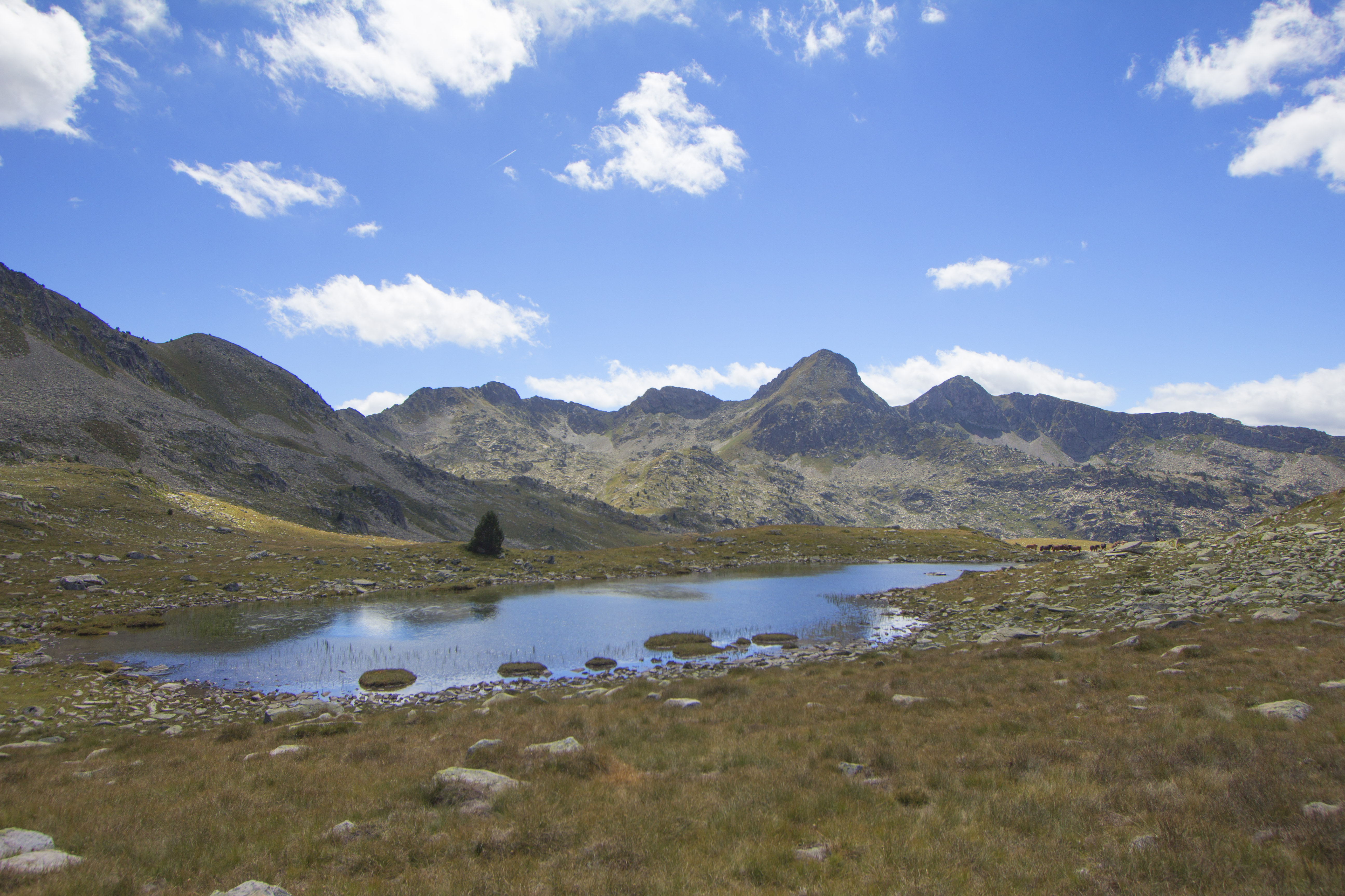 Tuc de la Llança (esquerra) i Escornacrabes (dreta), massis de Beret (vall d'Aran)